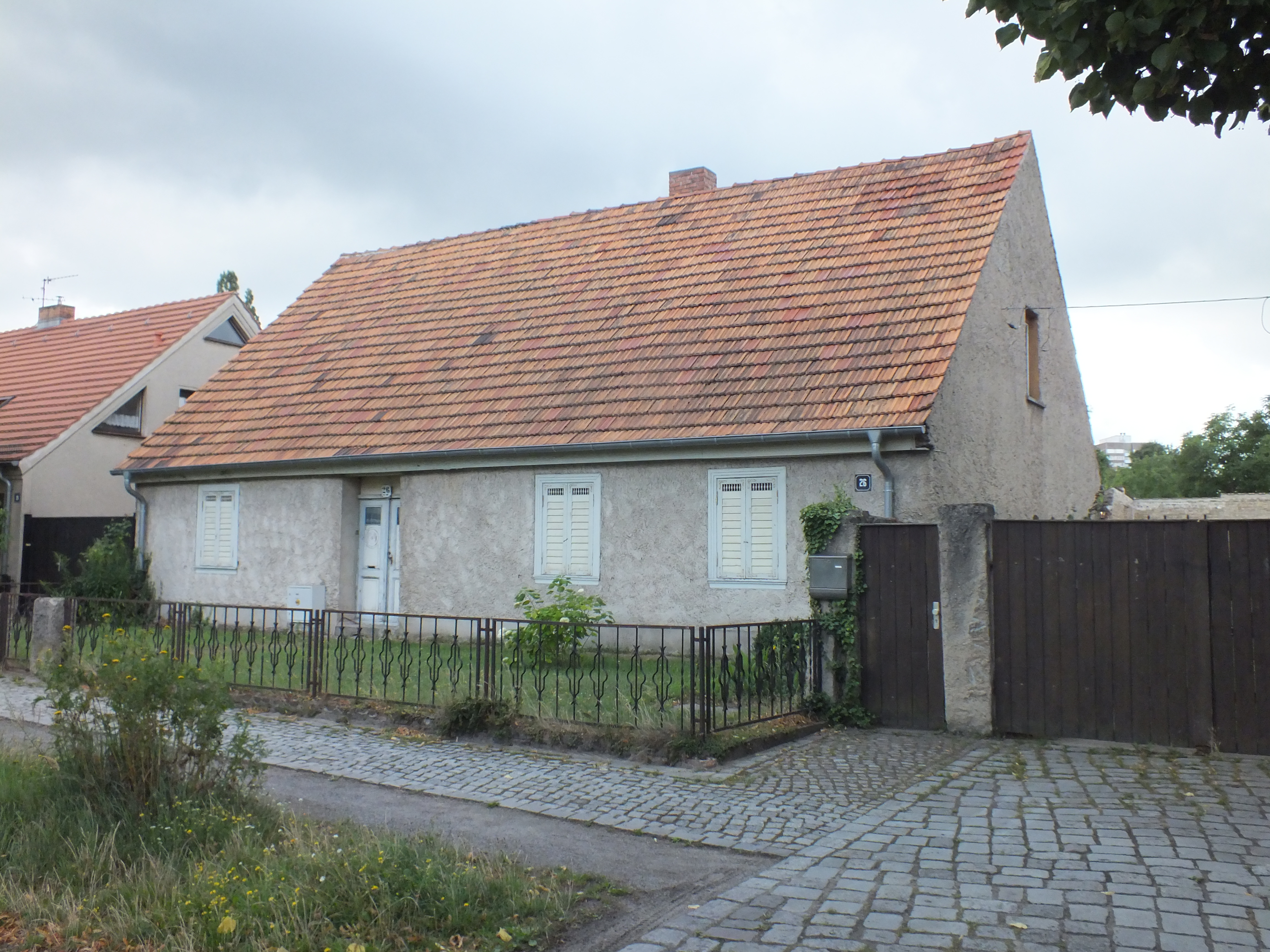 Berlin, Straße und Gebiet Alt-Marzahn